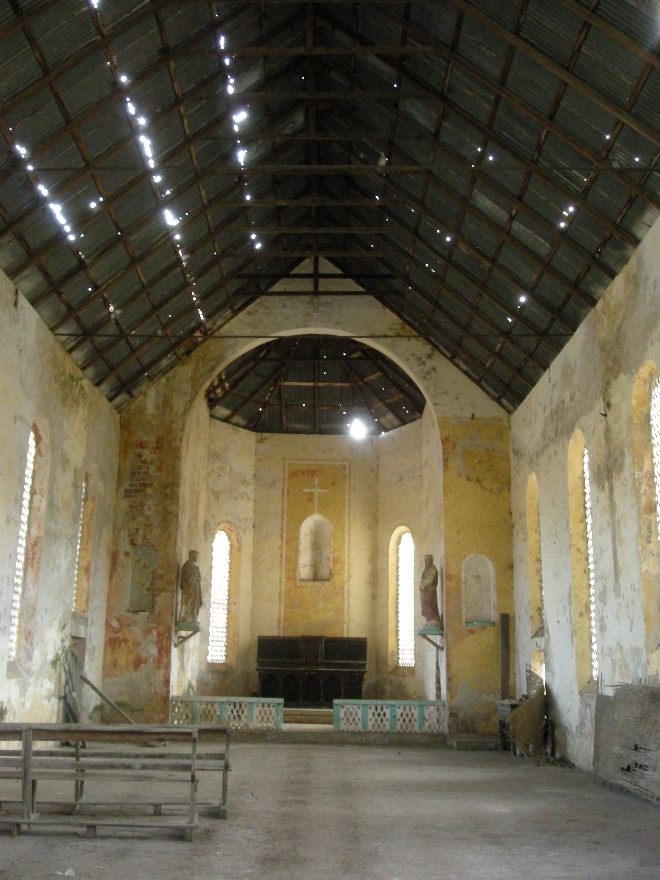 Intérieur de l'église bretonne de l'île de Carabane (Casamance, Sénégal)